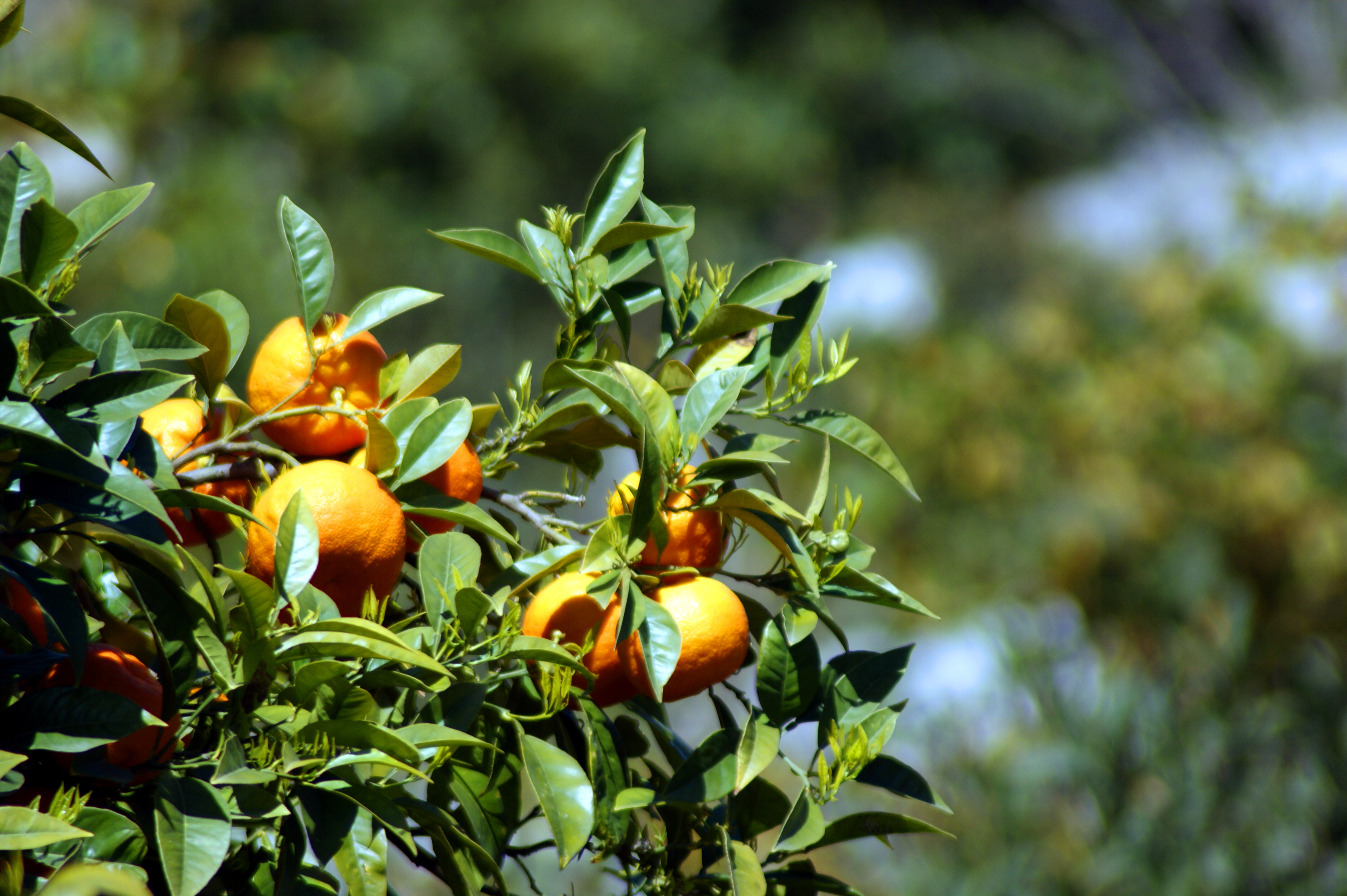 Arance alla zona archeologica di Siracusa